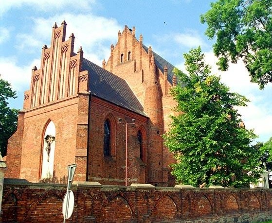 Kościół parafialny w Brześciu Kujawskim w woj. kujawsko-pomorskim.